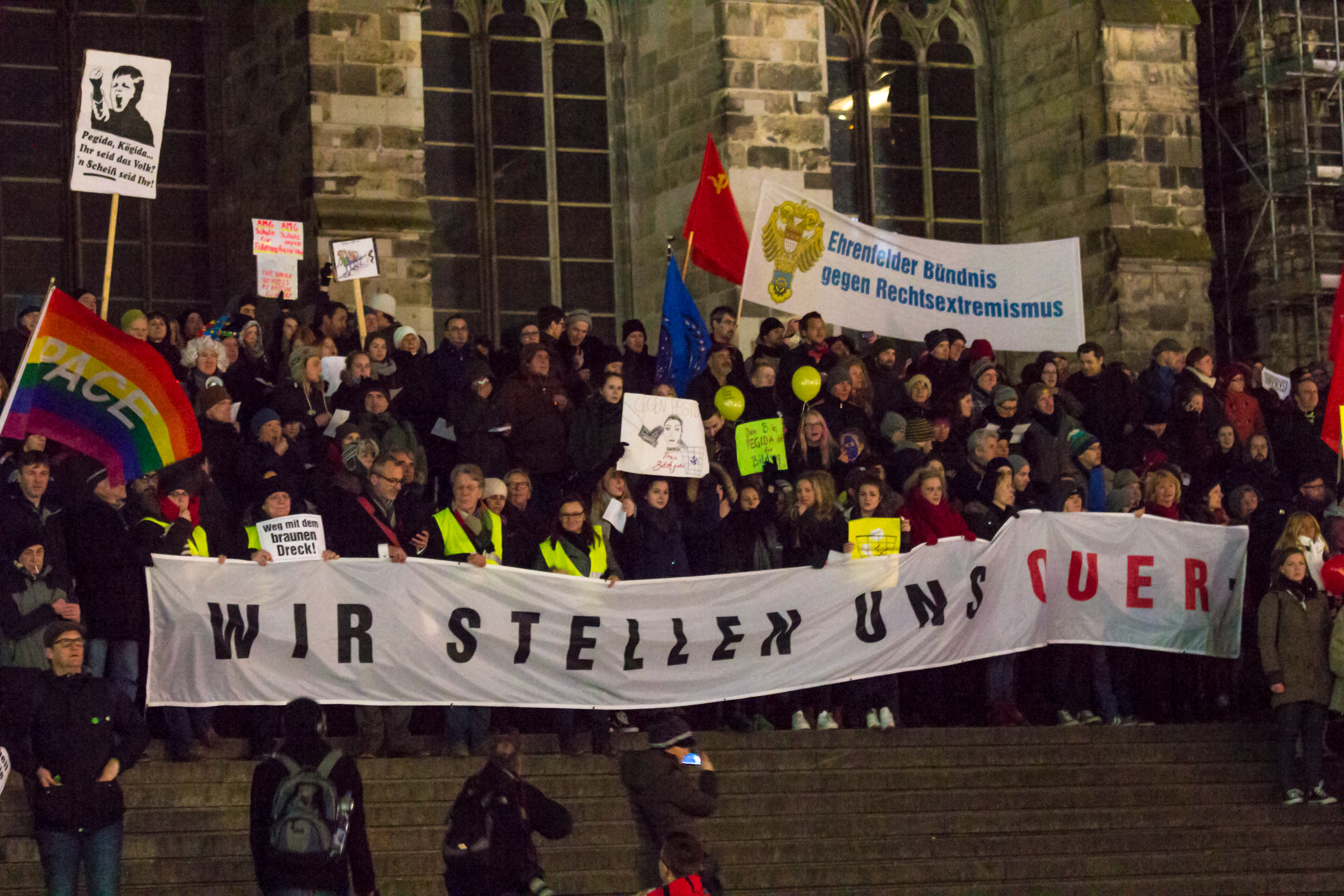 Köln stellt sich quer – nokögida 21. Januar 2015 Foto: Teilnehmer an der kögiga-Gegendemonstration (nokögida) auf der Treppe vom Bahnhofsvorplatz zur Domplatte. Transparent „Wir stellen uns quer“